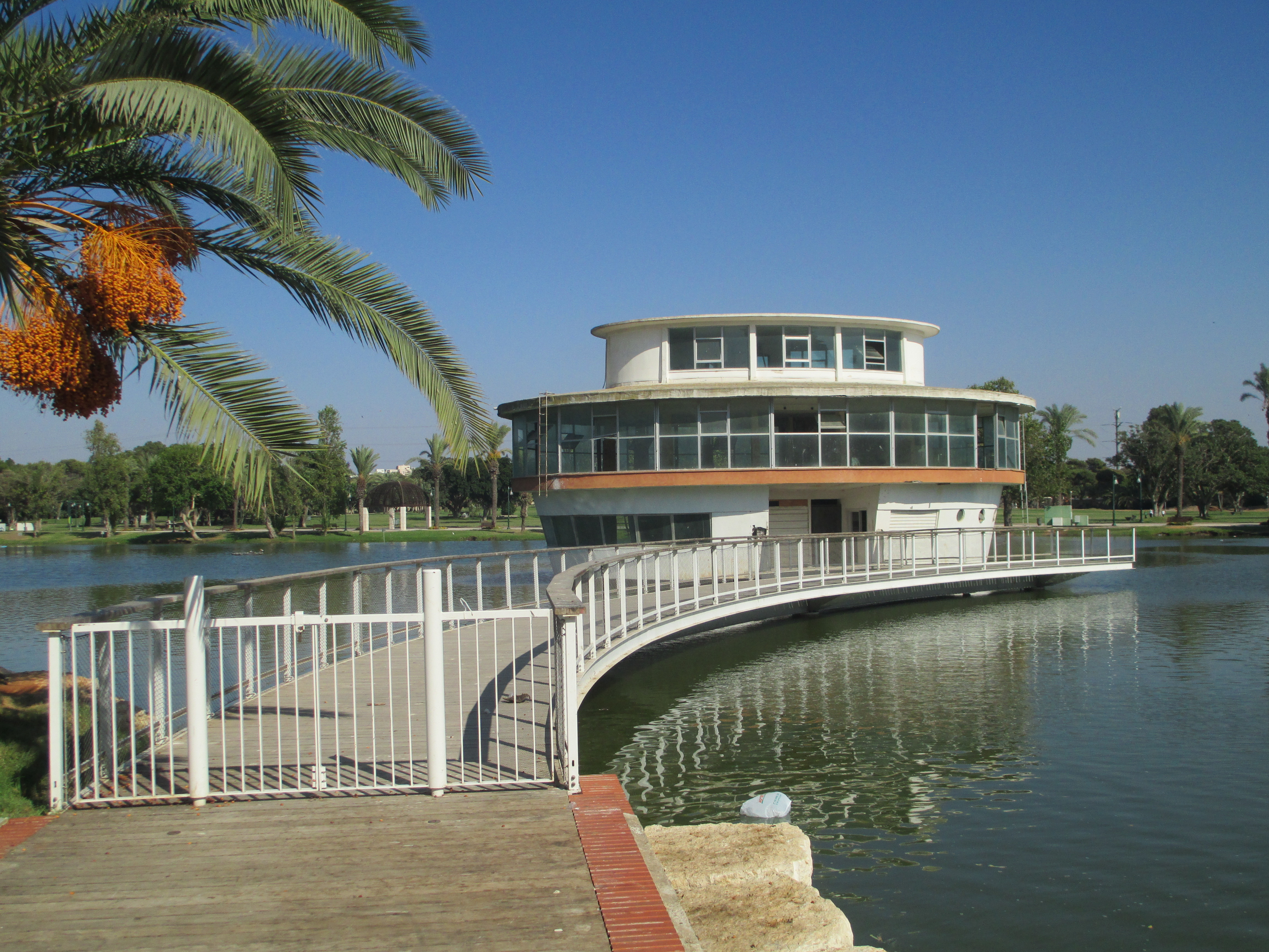 המבנה העגול והגשר החדש בפארק הלאומי ברמת גן